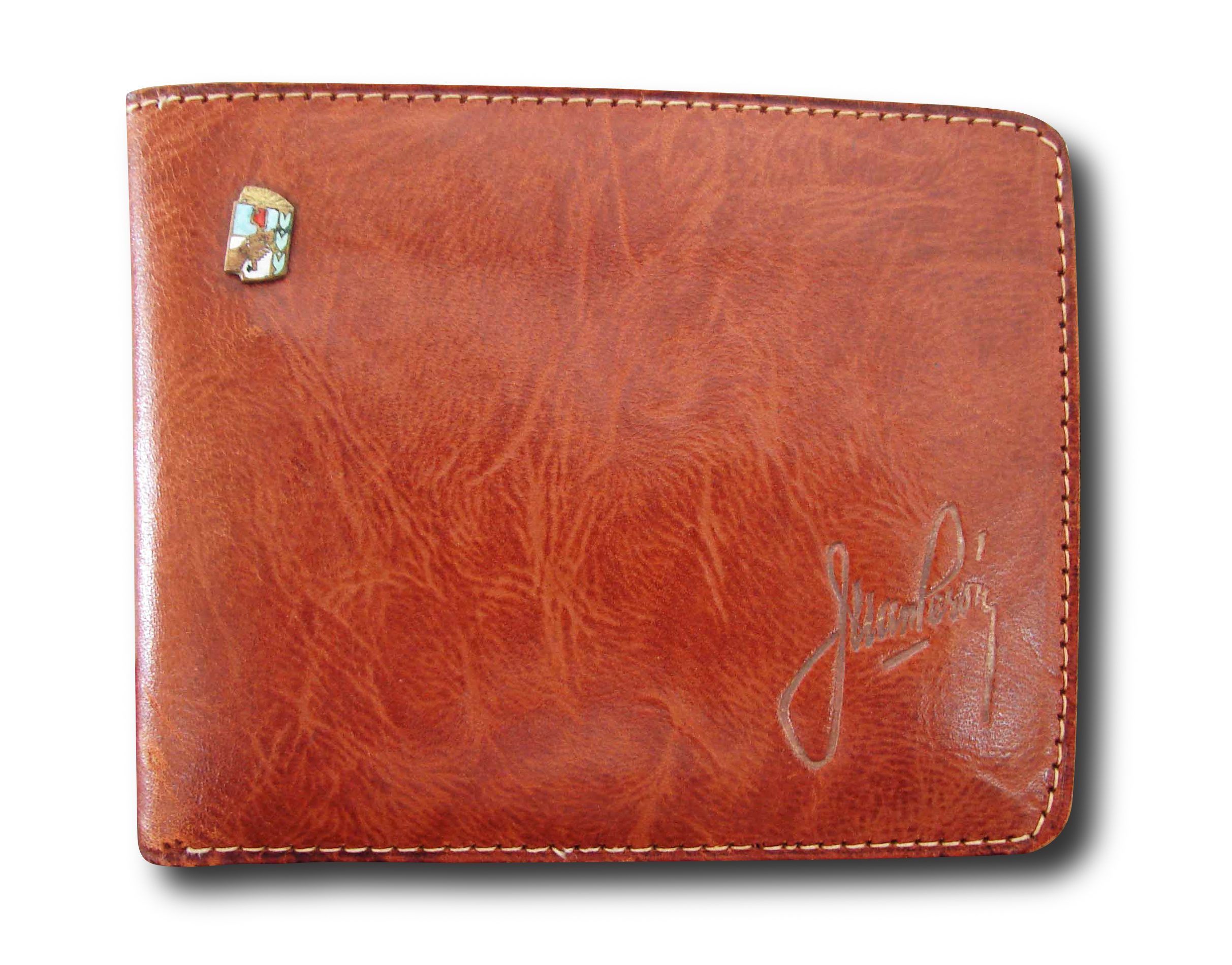 Souvenir típico del primer gobierno peronista; ostenta el escudo del Partido Justicialista y la firma de Juan Domingo Perón.